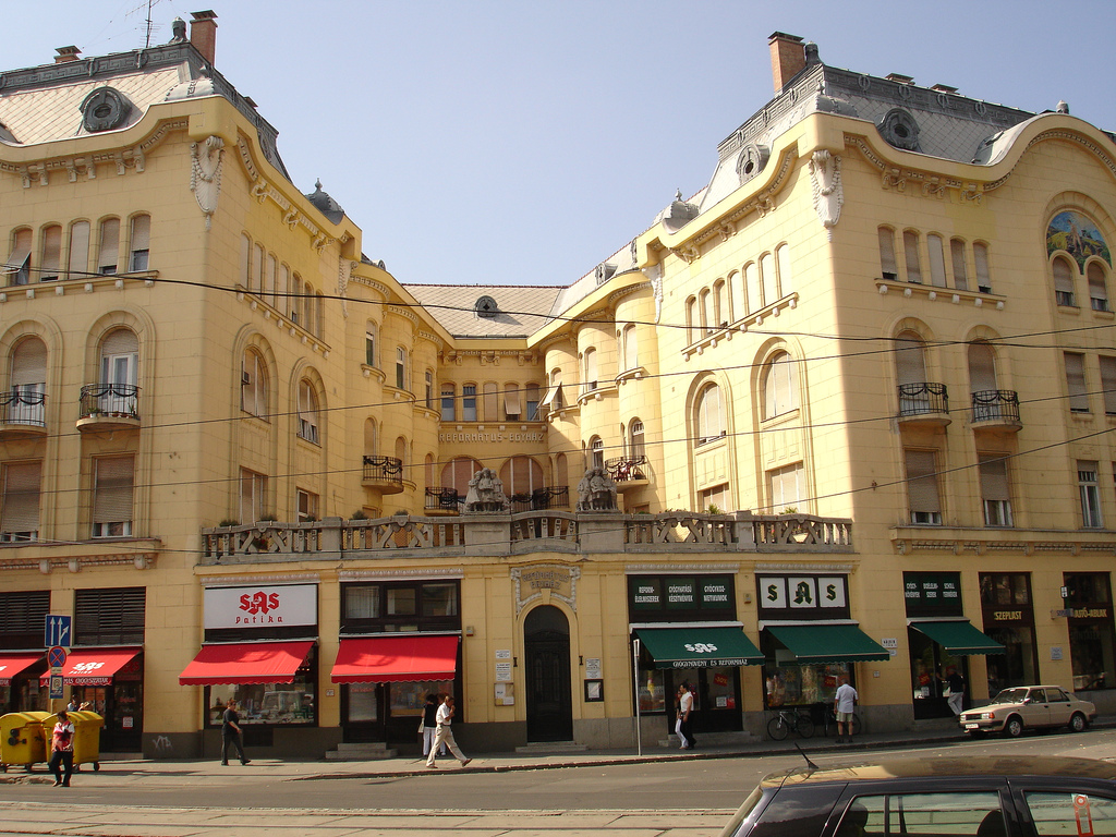 Református palota, épült 1911